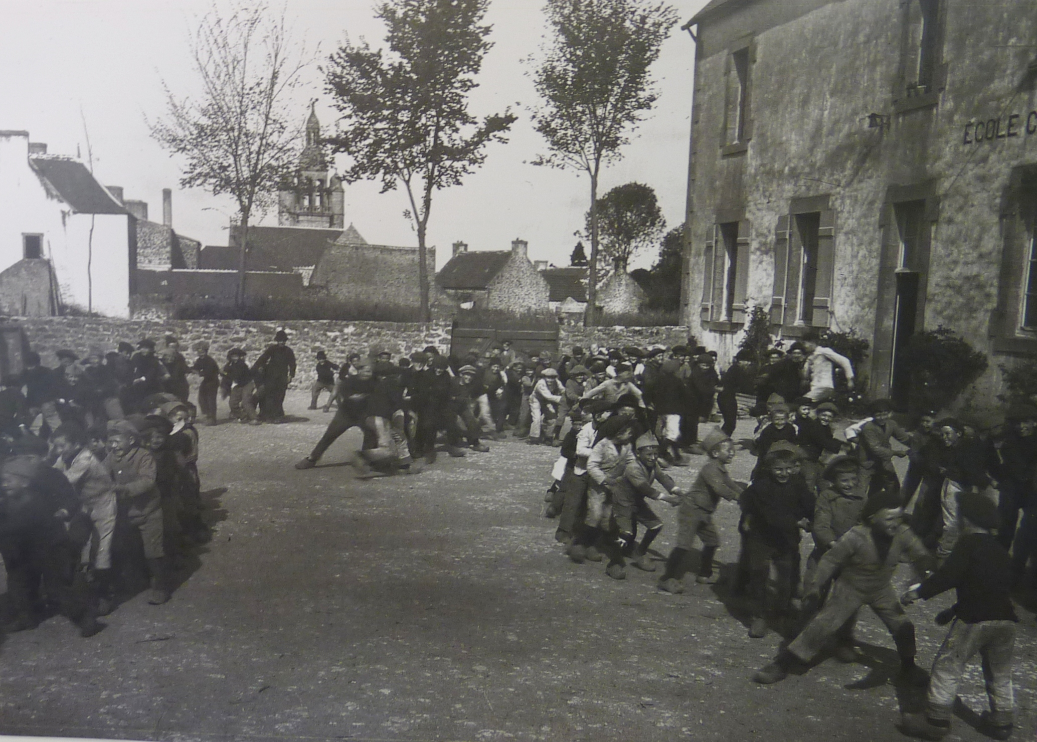 Combrit : chahut d'écoliers dans la cour de l'école privée de garçons du bourg de Combrit (début XXème siècle, photographe inconnu)